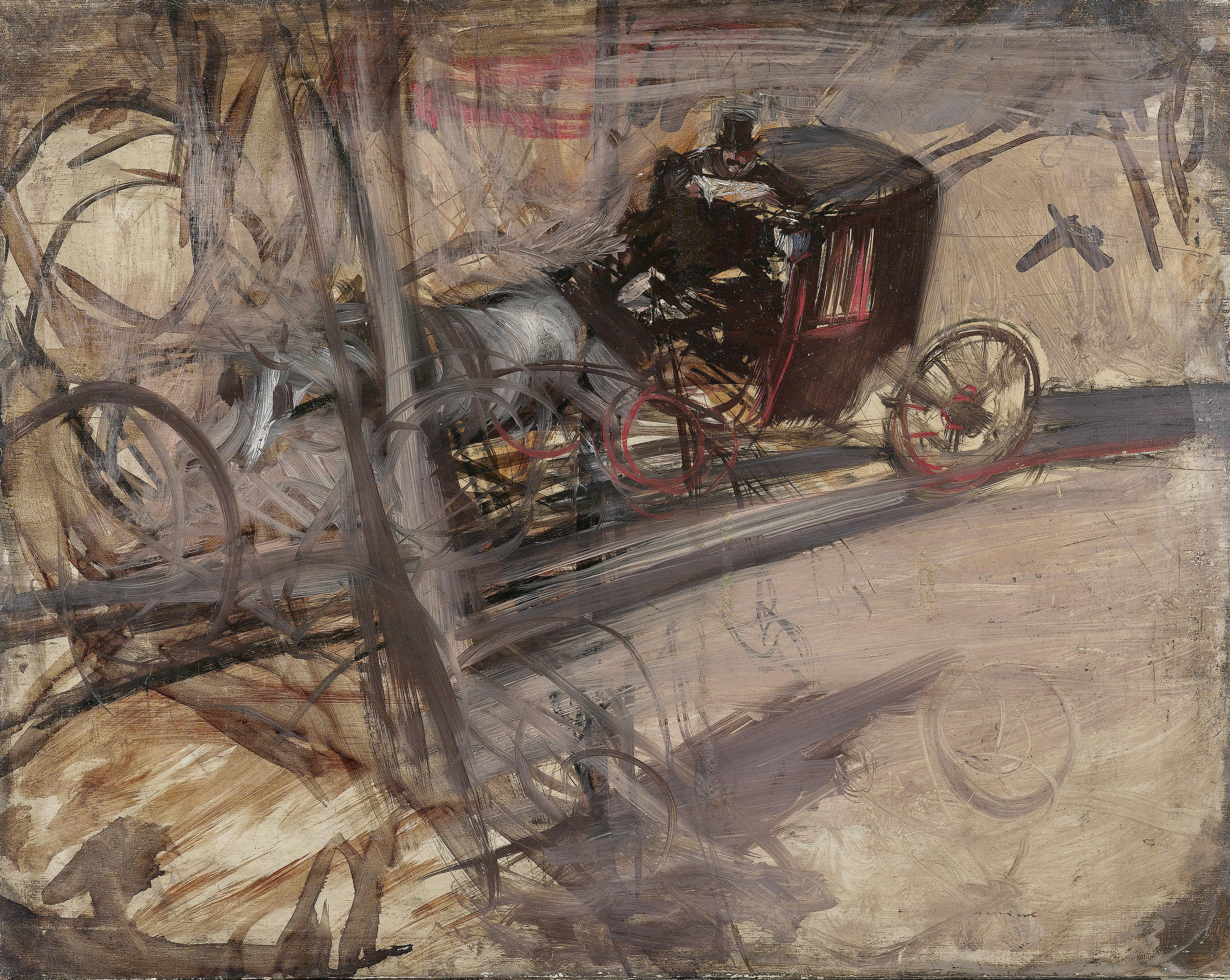 Der Kutscher, um 1905, rückseitige Bezeichnung von Enrico Piceni "opera autentica e caratteristica del miglior Boldini" sowie Stempel der Mondial Gallery, Mailand, Öl auf Holz, 27,5 x 35 cm